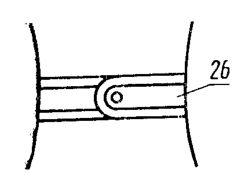 Изображение из ГОСТ 22977-89 (СТ СЭВ 6484-88) — Детали швейных изделий. Термины и определения.